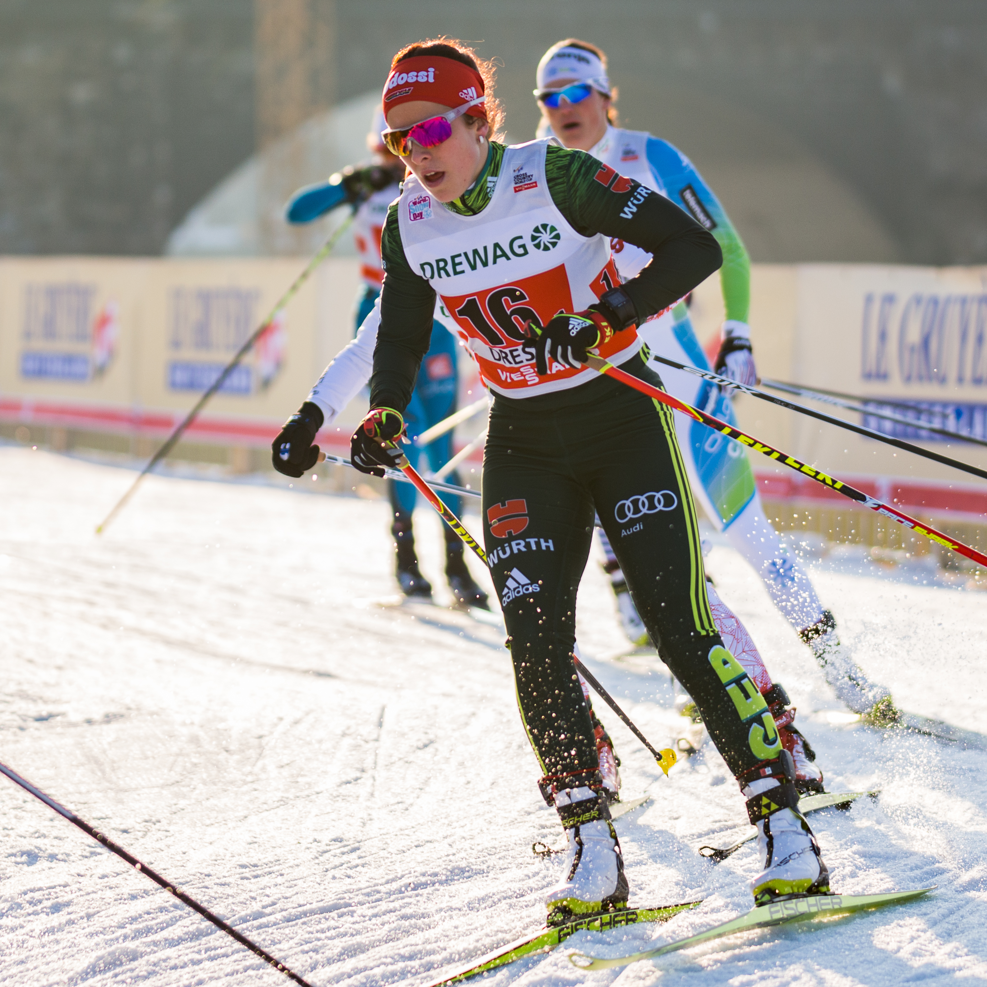 Vorläufe zum Team-Sprint; Katharina Hennig (GER, Deutschland)